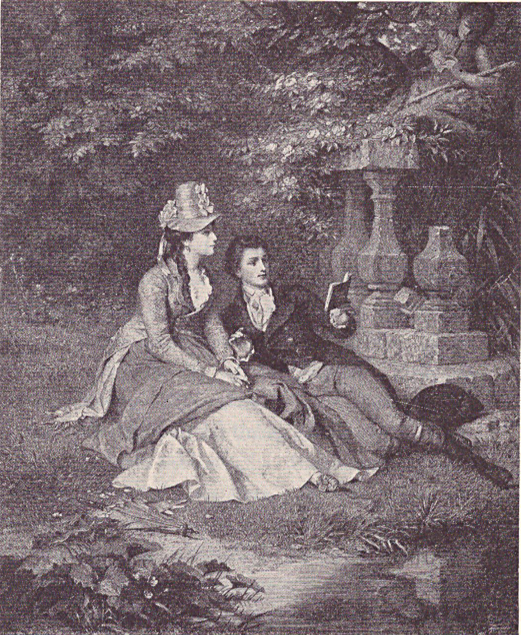 Holzschnitt nach einem Ölbild von Arthur von Ramberg, dem Neffen des Hannovraner Malers J.H. Ramberg, der Linsingens kannte und den Vorwurf zu diesem Gemälde gab.